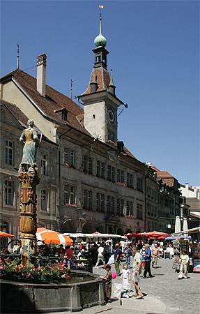 Lausanne: Hôtel de ville (Place de la Palud)